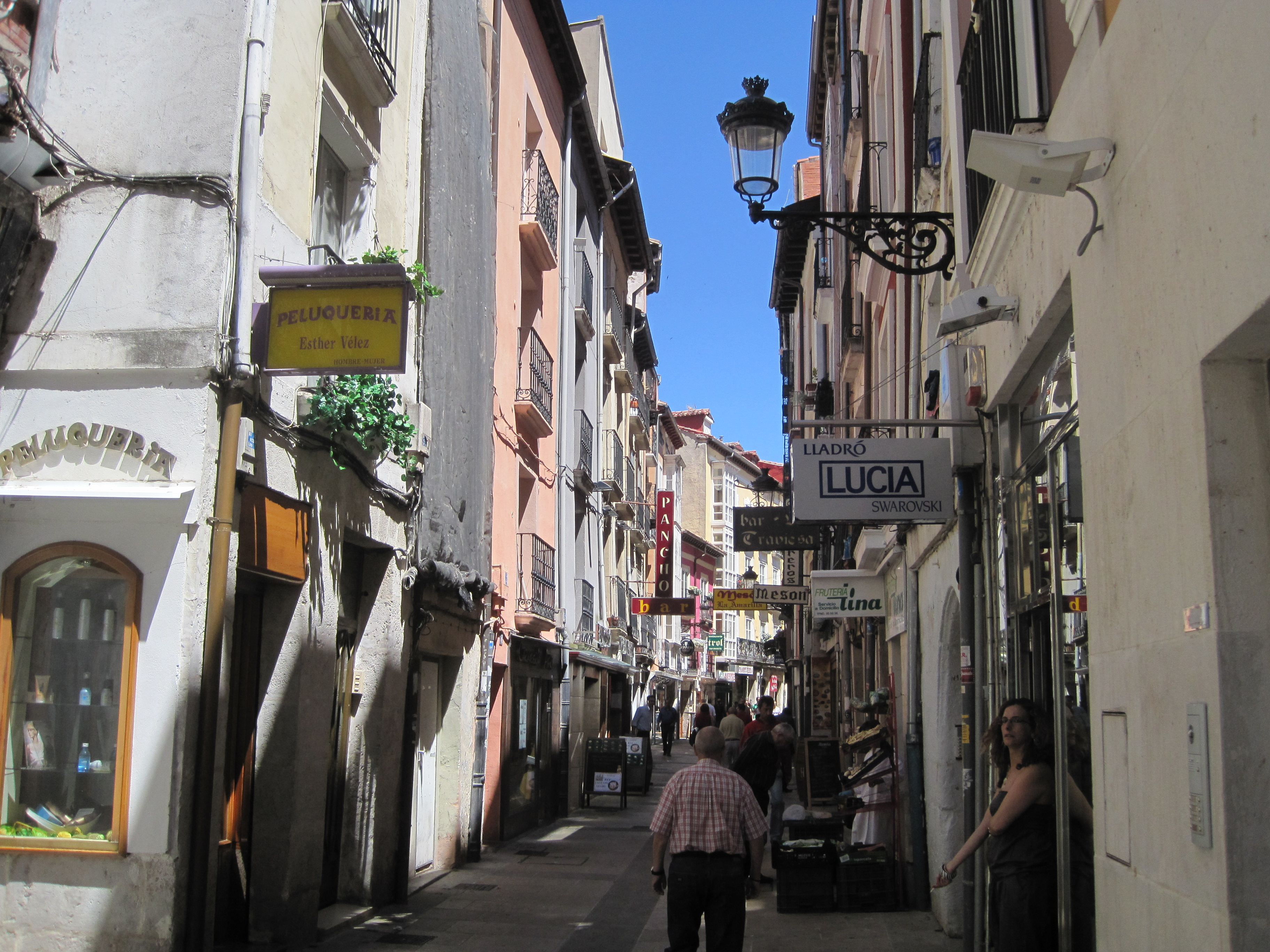 C/ San Lorenzo, una de las más emblemáticas de la ciudad para la práctica del tapeo.